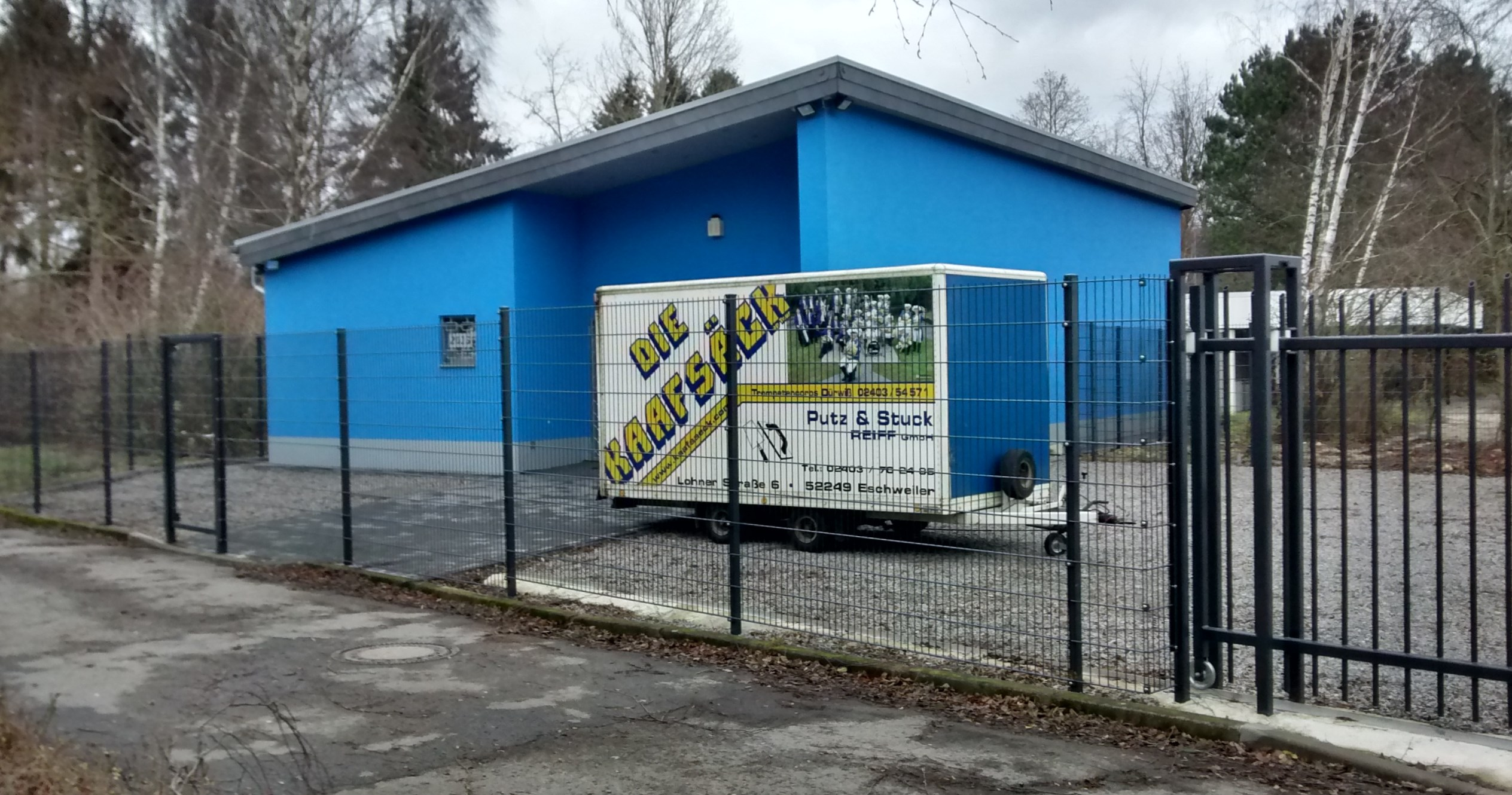 Impressionen aus der südöstlichen Umgebung des Blausteinsees und des Naherholungsgebiets Dürwiß vom Dezember 2014.